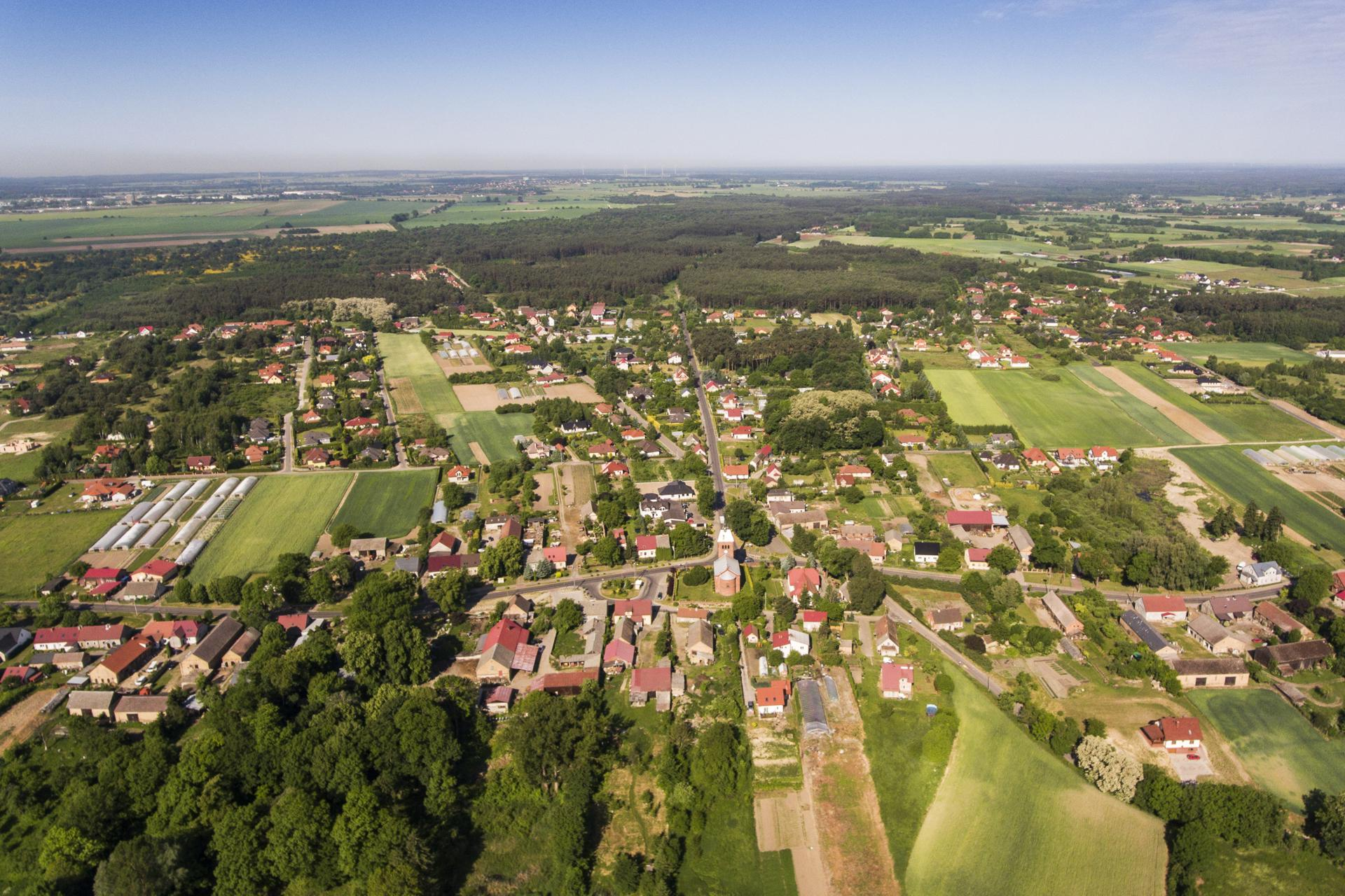 Chwalęcice z lotu ptaka